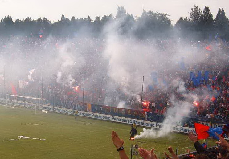 Steaua supporters